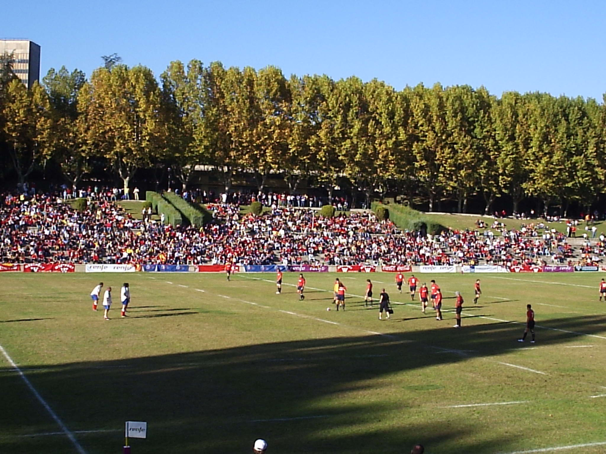 España contra la República Checa en Ciudad Universitaria